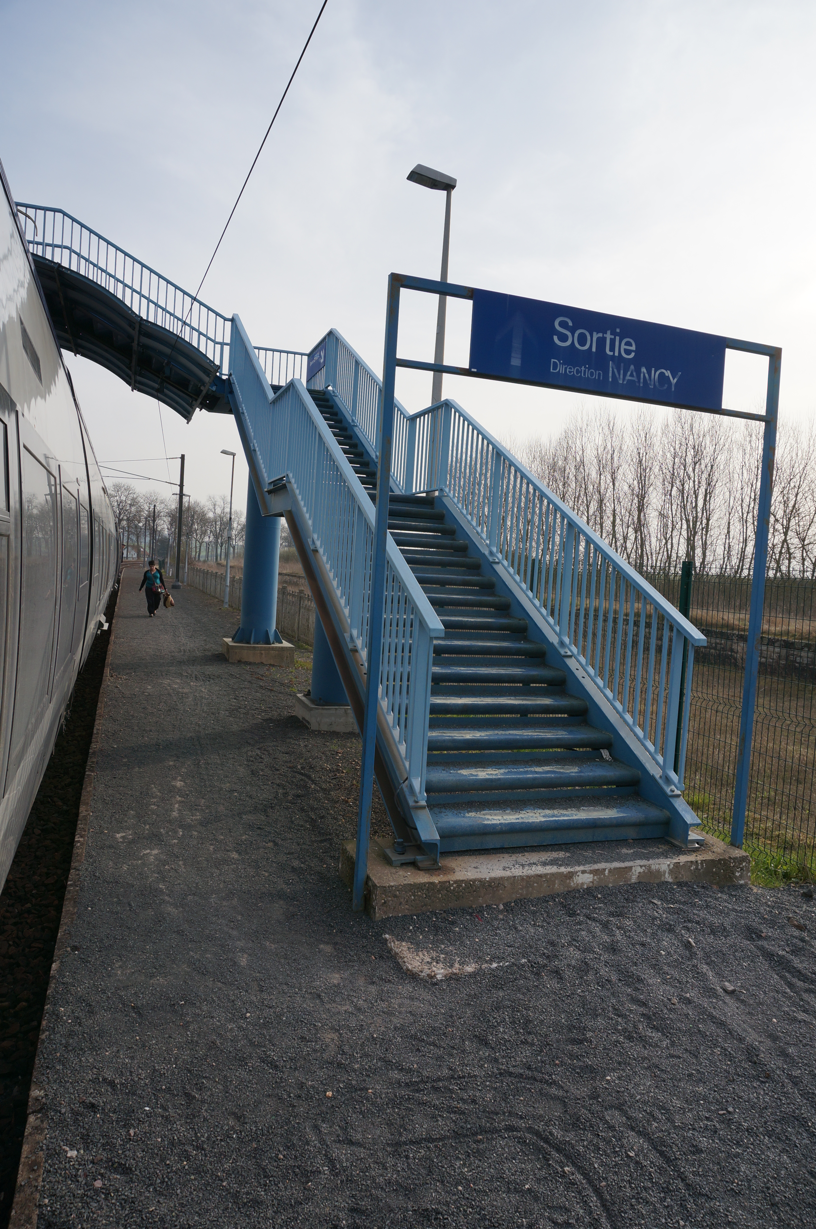 gare.